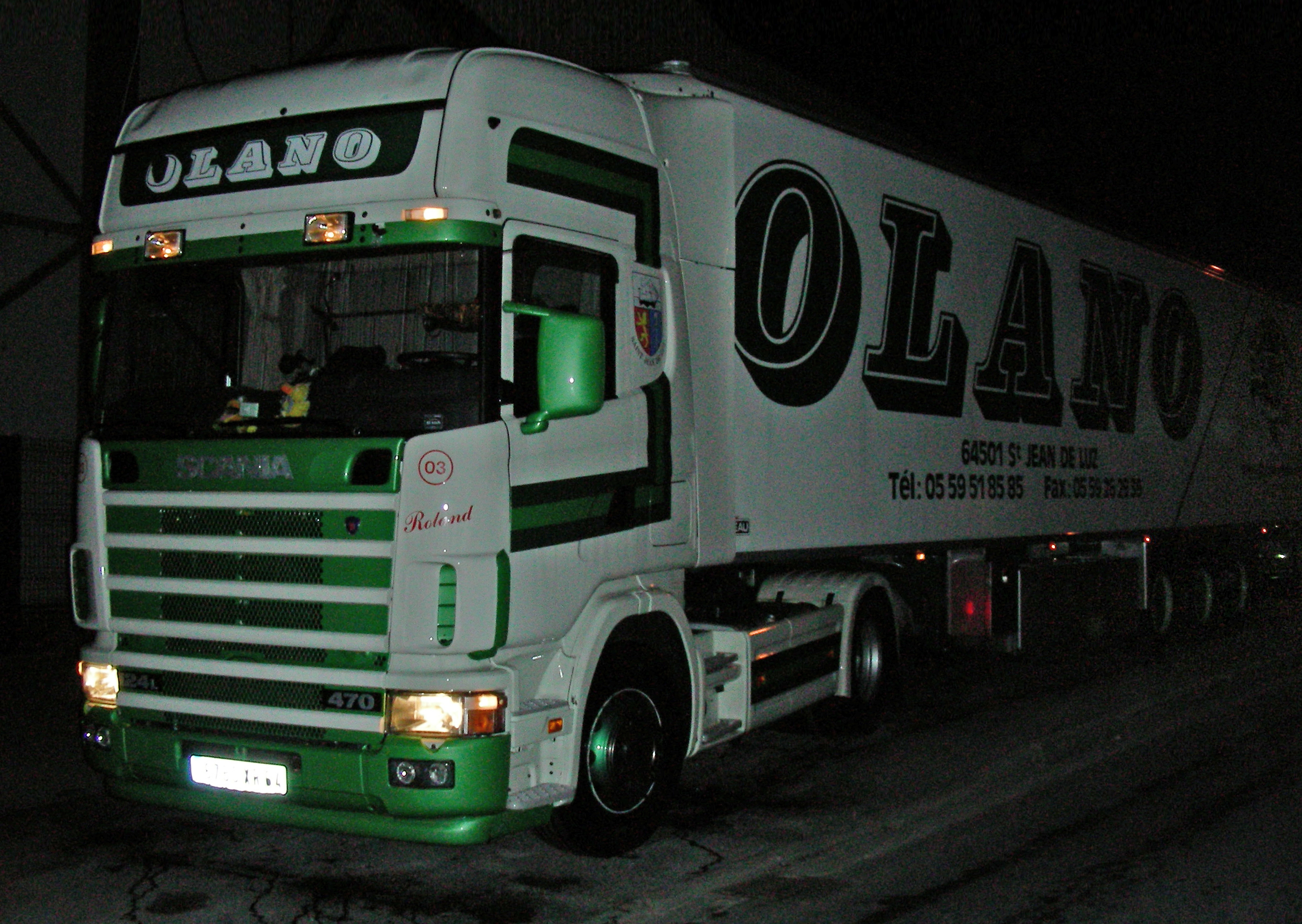 Un camion Scania R1?? 470 Olano de nuit.